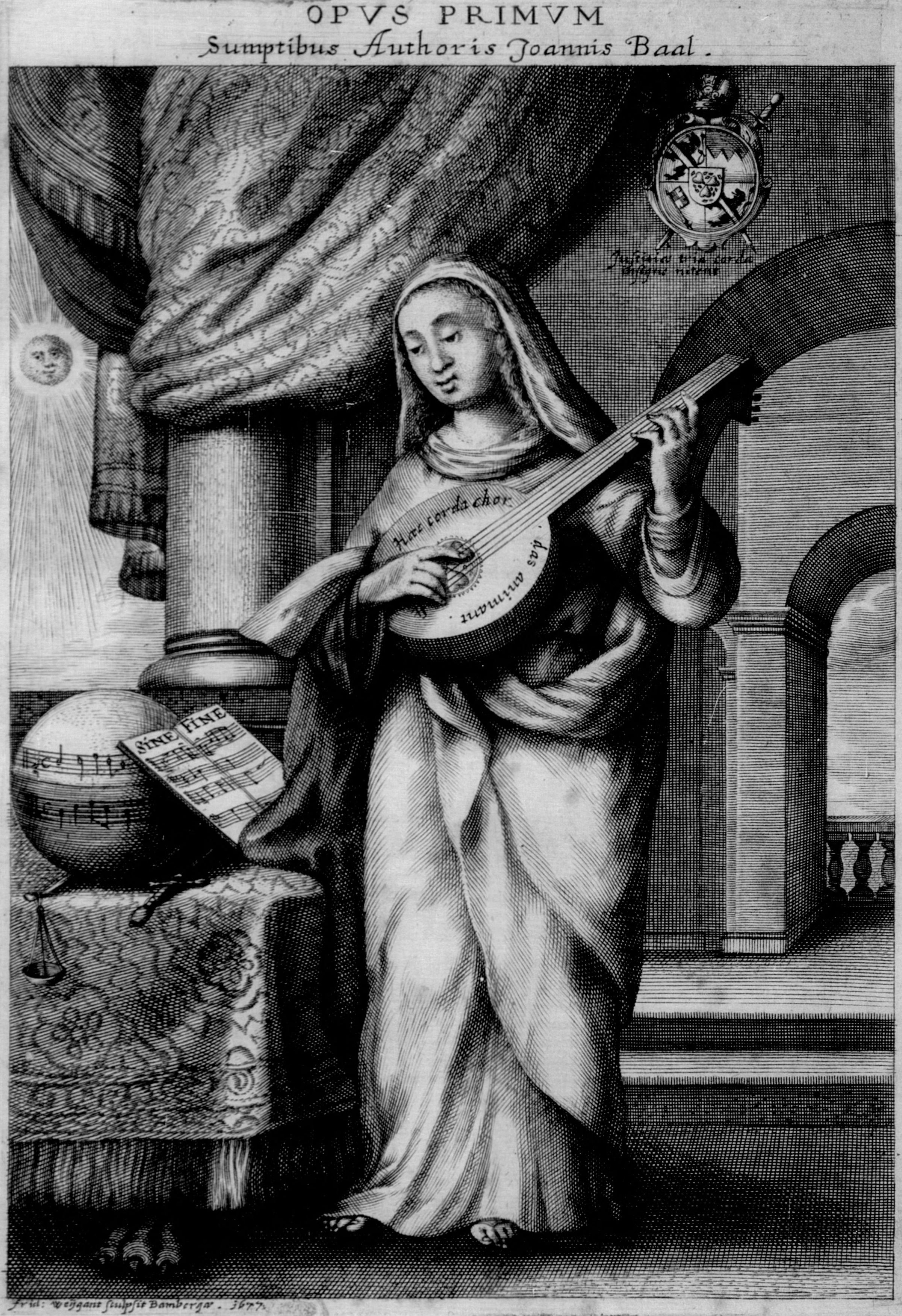 From Johann Baal: Opus Primum